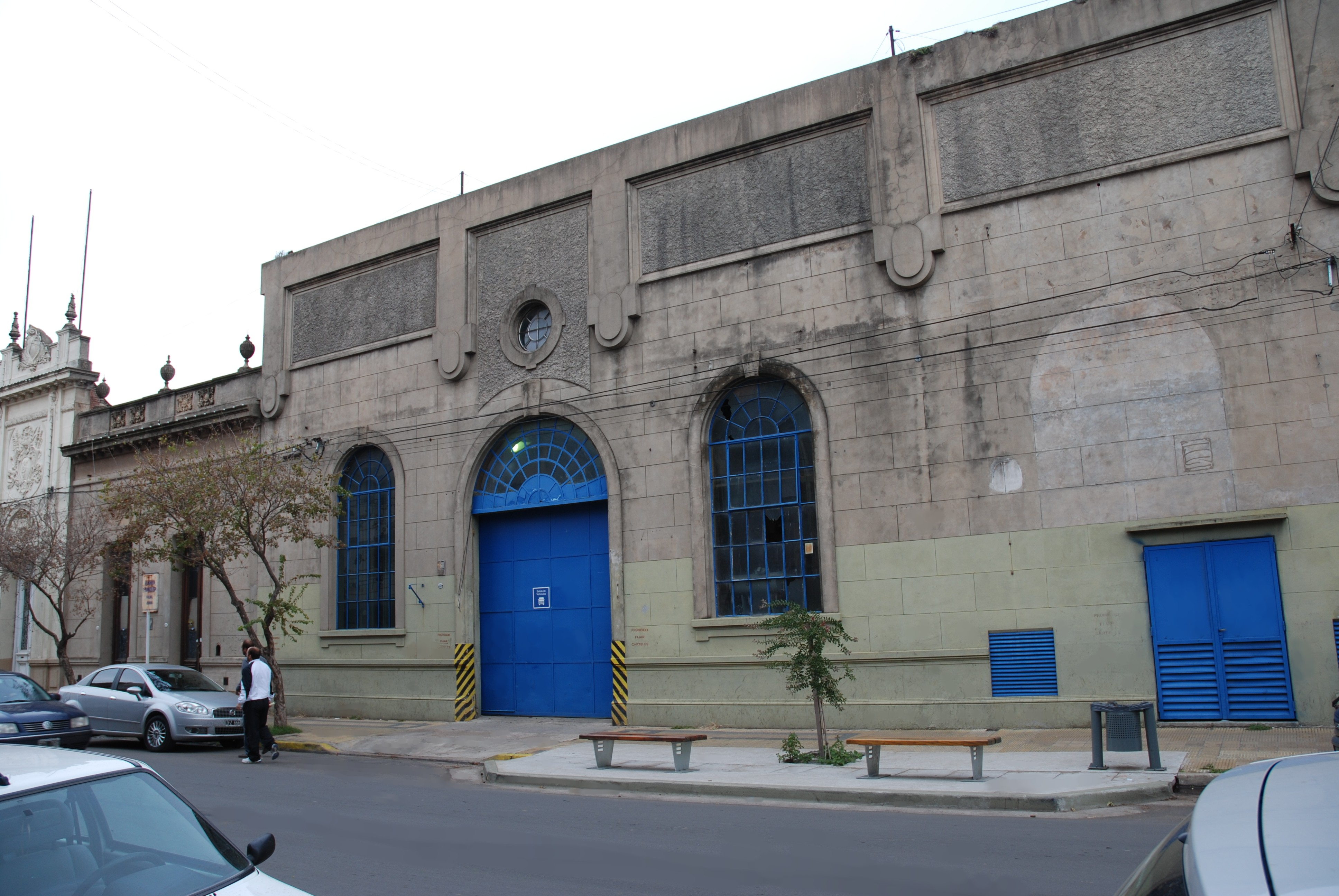 Edificio de la ex usina eléctrica de Junín, Argentina.